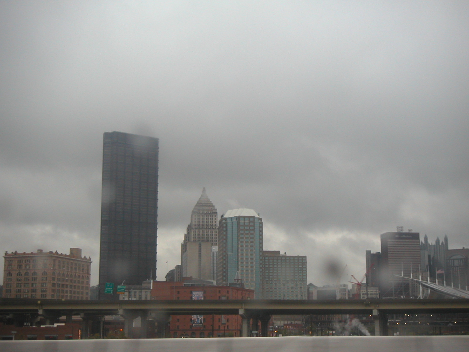 Pittsburgh